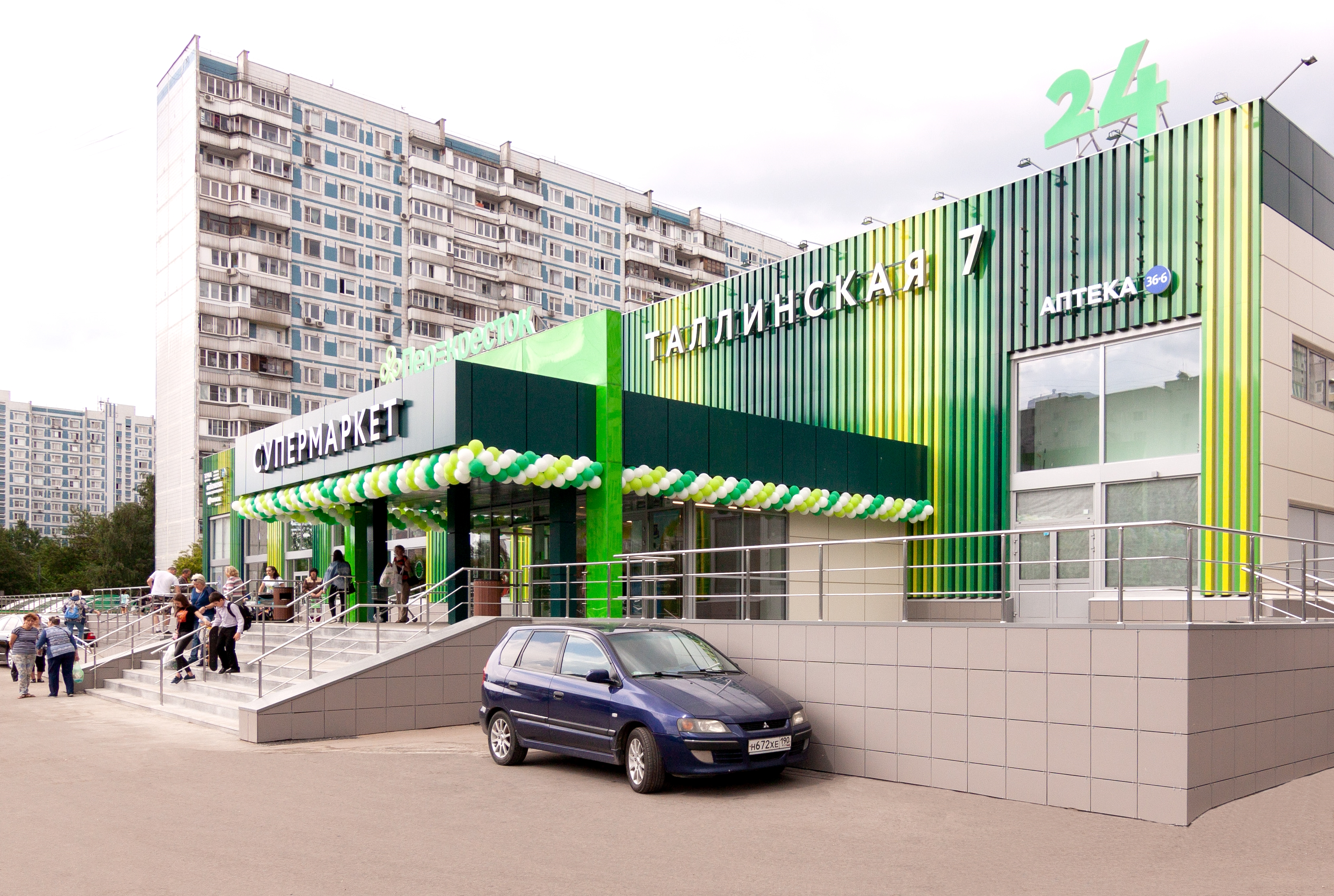 С февраля 2020 года все новые супермаркеты «Перекрёсток» открывают в новой концепции, включающей обновлённые логотип, дизайн интерьера и фасадов, ассортимент, набор дополнительных сервисов. Около половины торгового зала должны занимать продукты категории fresh, то есть фрукты, овощи, молочная продукция, сыры, мясная гастрономия, свежая рыба и мясо, а также салат-бар, пекарня и кафе. Также в новой концепции предусмотрена специальная зона с товарами для ведения здорового образа жизни.